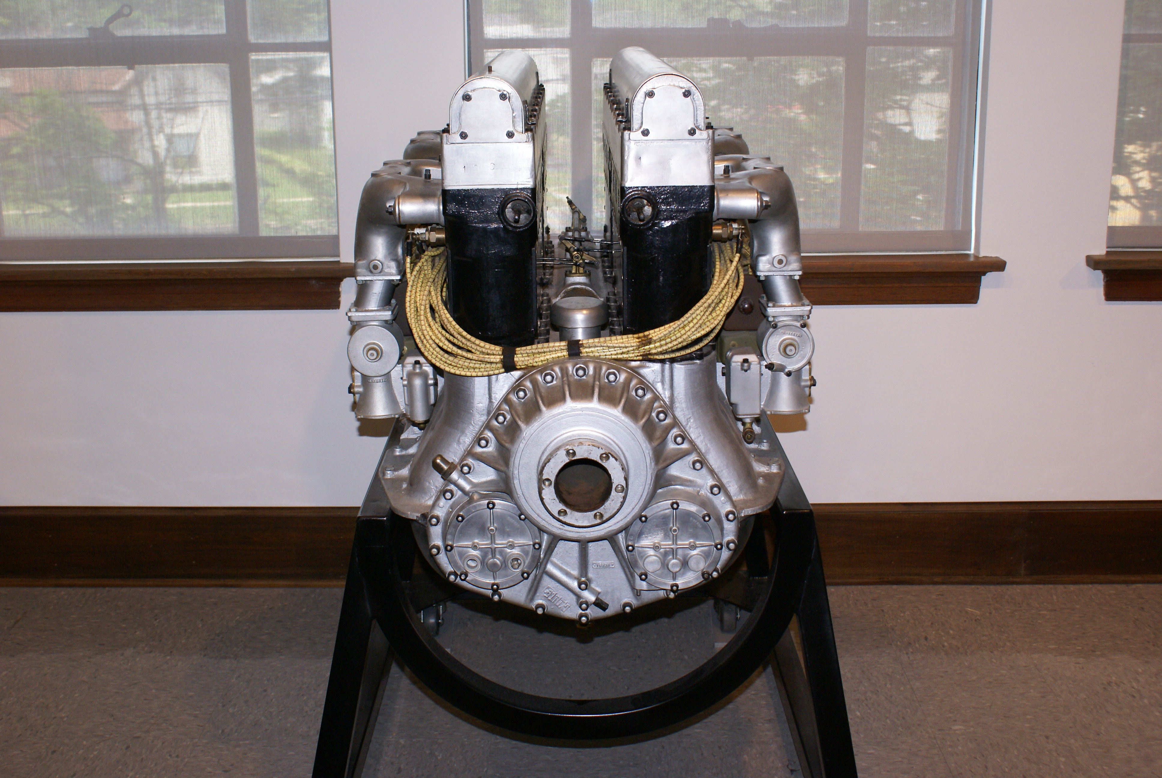 King-Bugatti U-16 aero engine